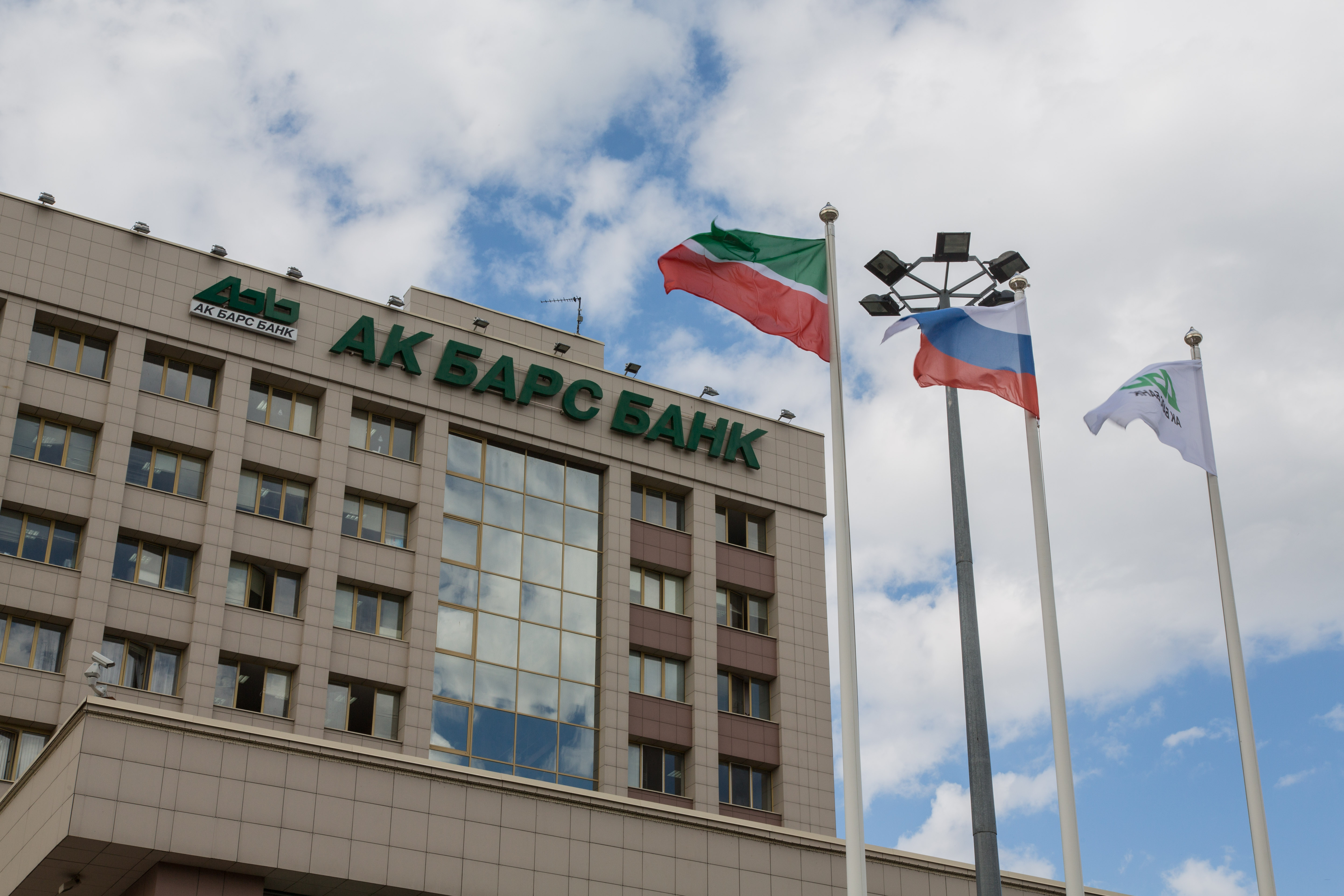 Главное здание "АК БАРС" Банка